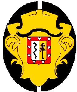 Escudo del municipio Andrés Bello, estado Mérida, Venezuela